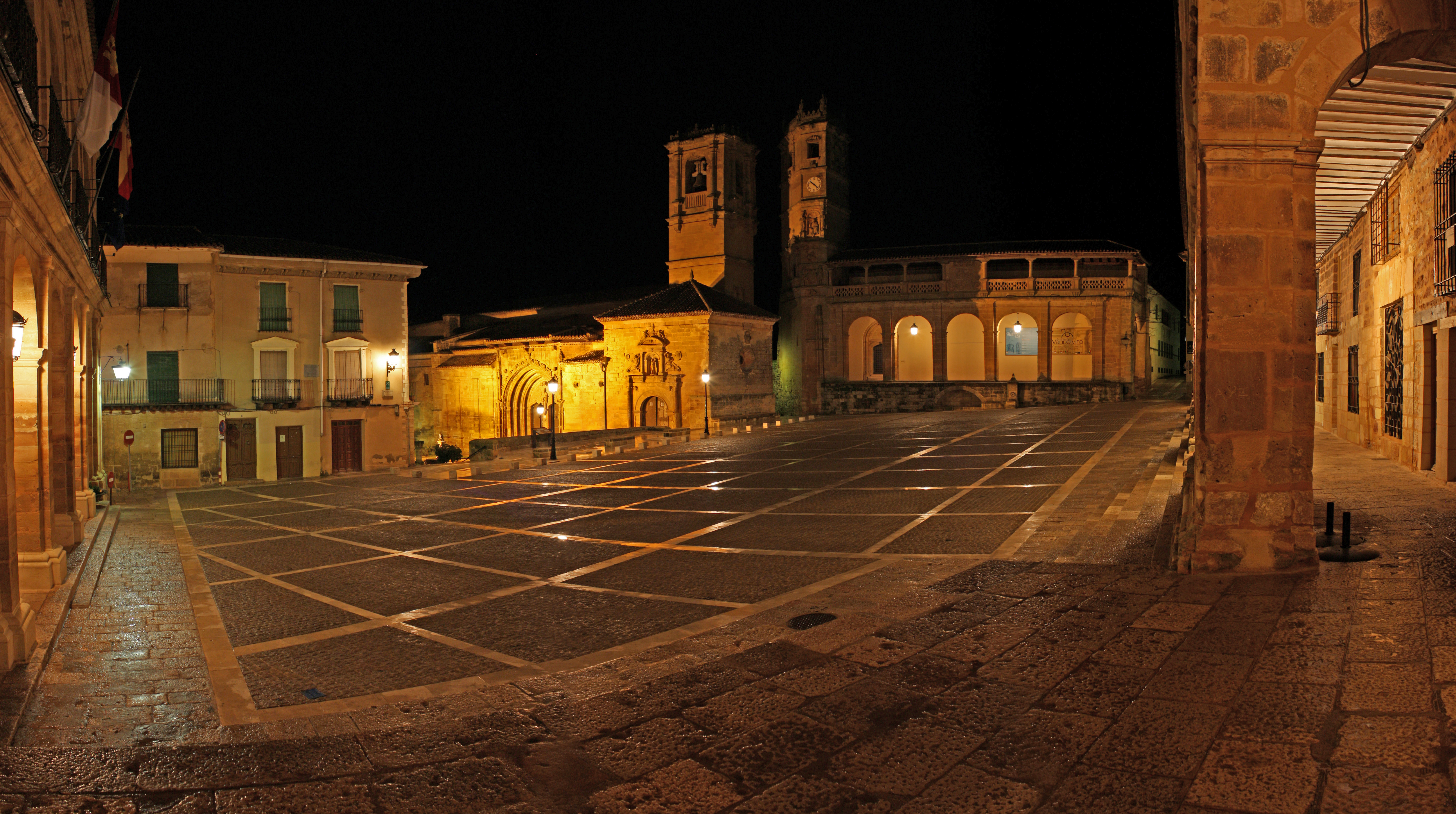 Obra de Andrés de Vandelvira. La Plaza Mayor de Alcaraz representa uno de los monumentos renacentistas más significativos de España.